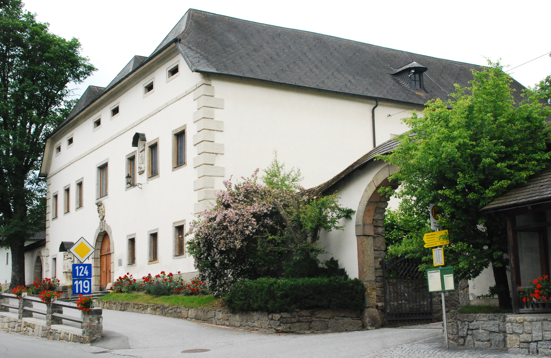 Herrenhaus in Arbesbach in Niederösterreich